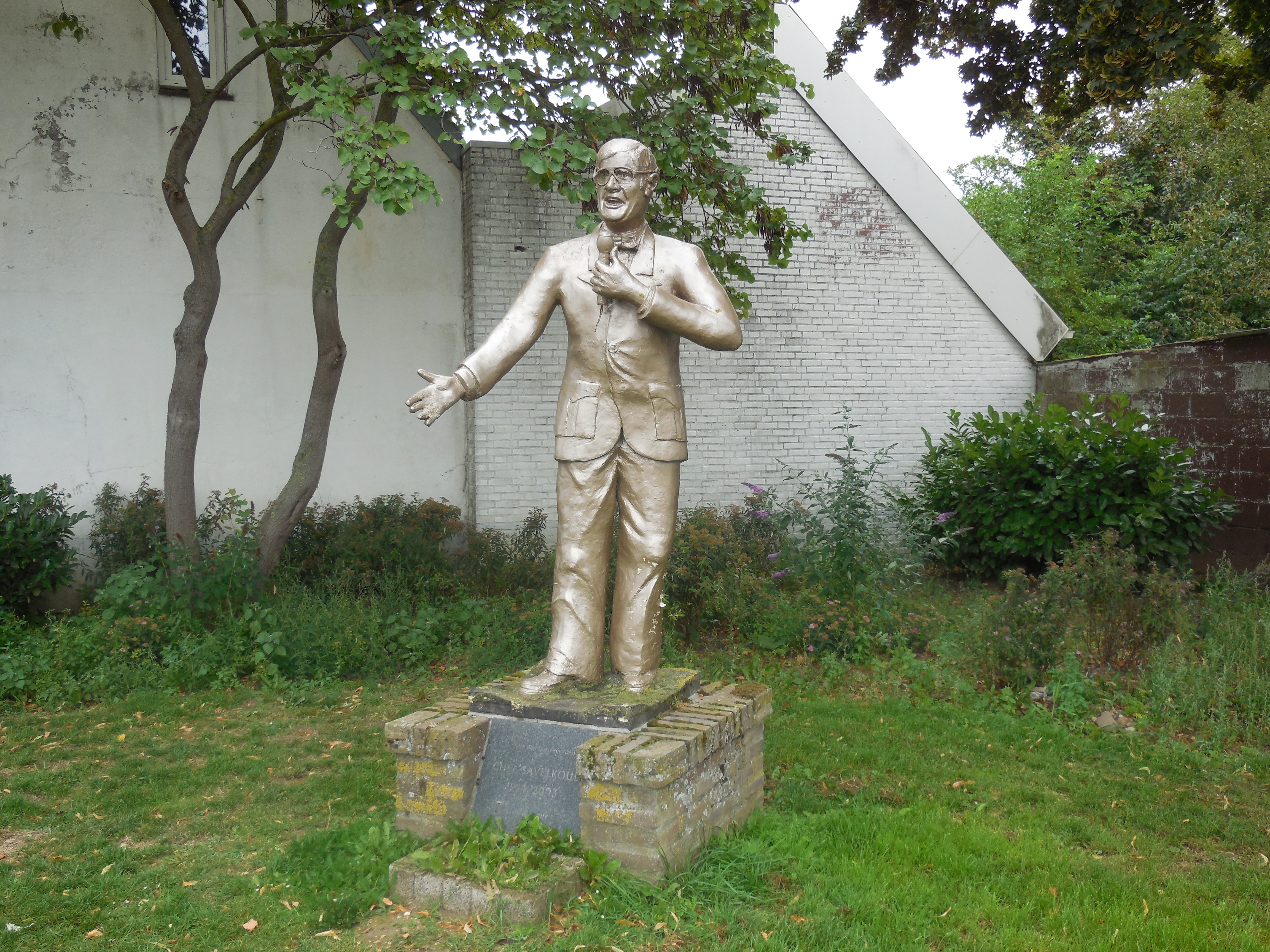 Beeld van zanger Chel Savelkoul